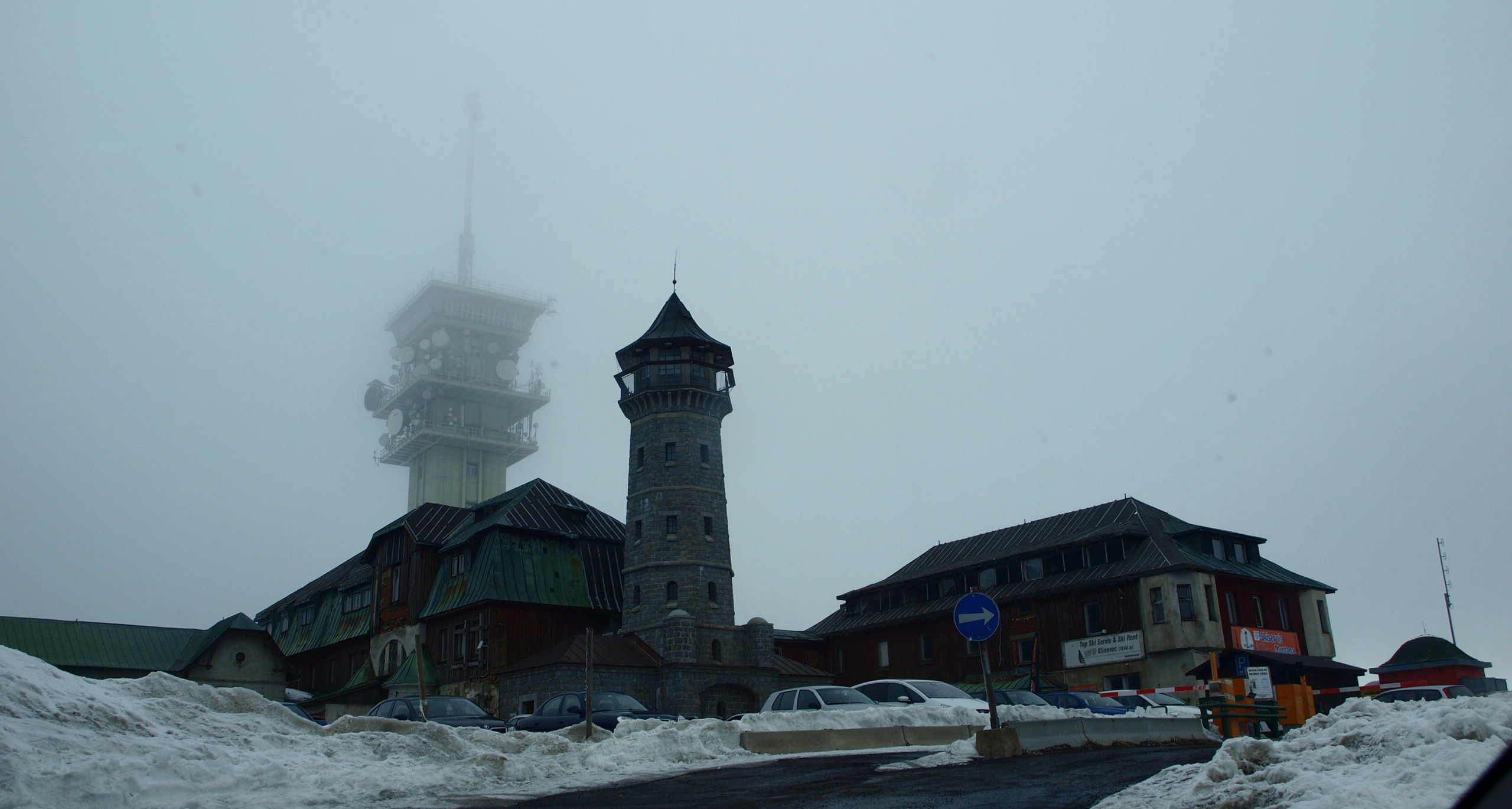 Klínovec